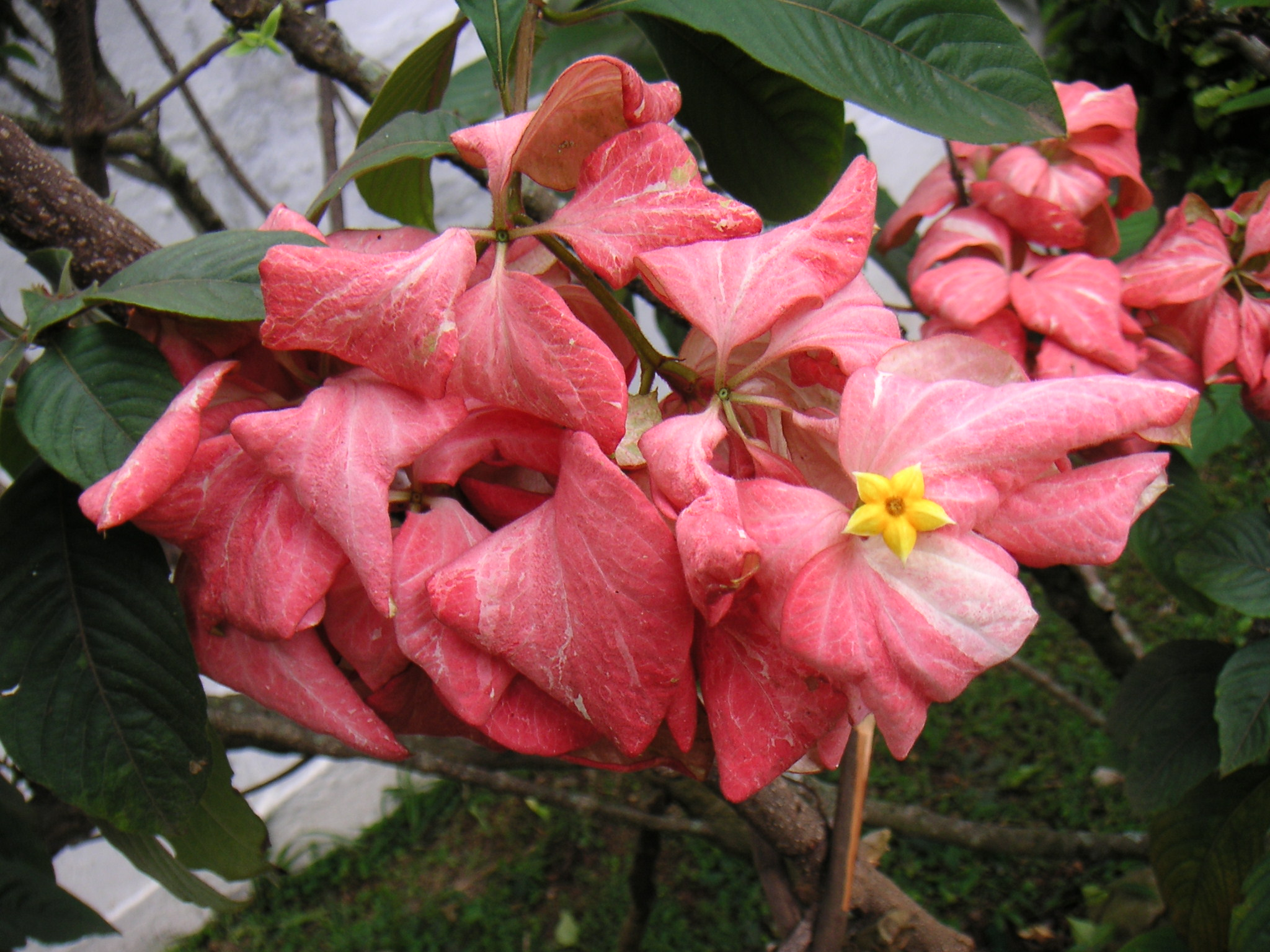 Mussaenda alicia, Rubiaceae, Cali / Kolumbien